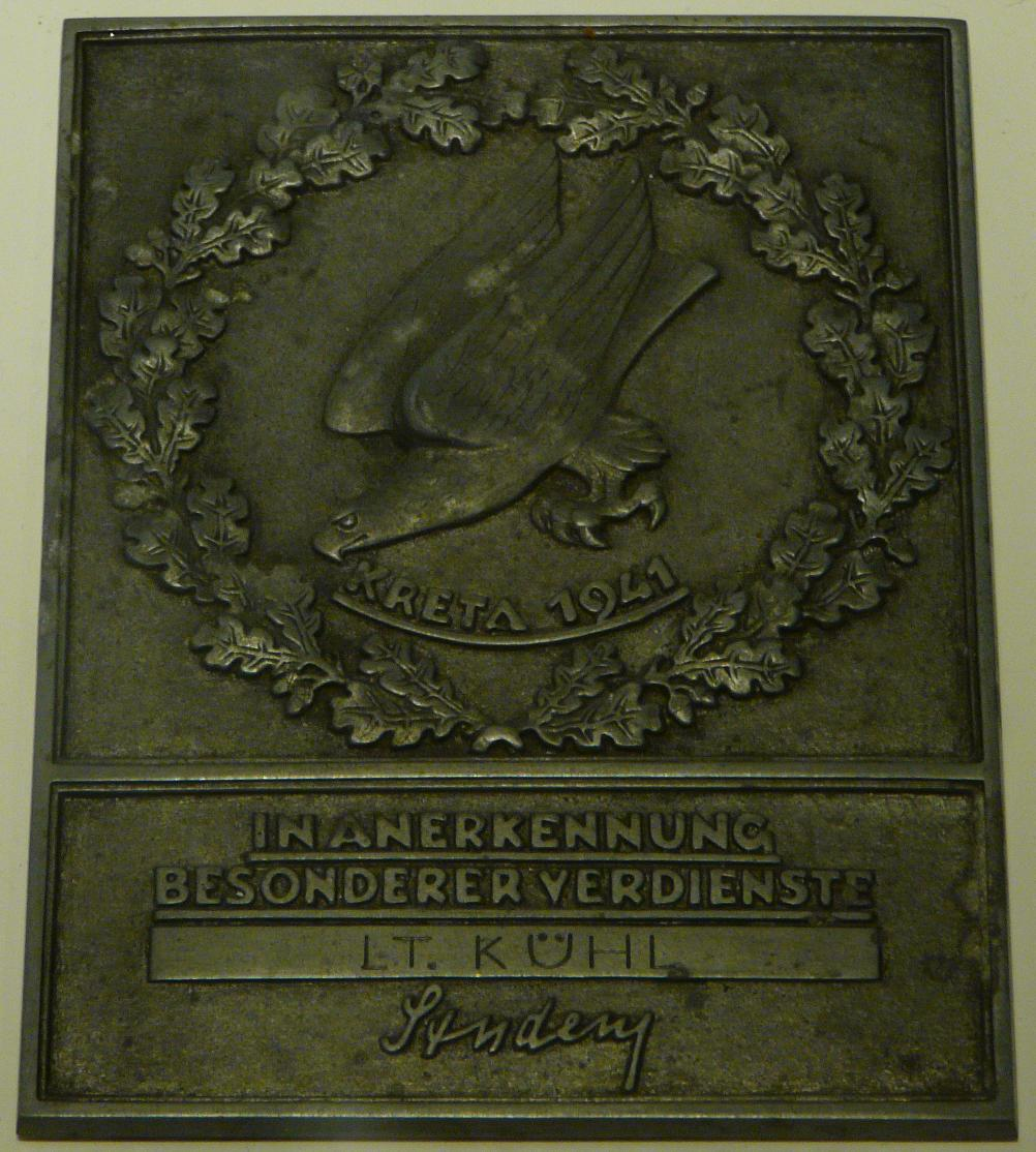 Ehrenschild des XI. Flieger-Korps (Kretaschild), ausgestellt auf Leutnant Kühl, Exponat des Militärhistorischen Museums der Bundeswehr in Dresden.